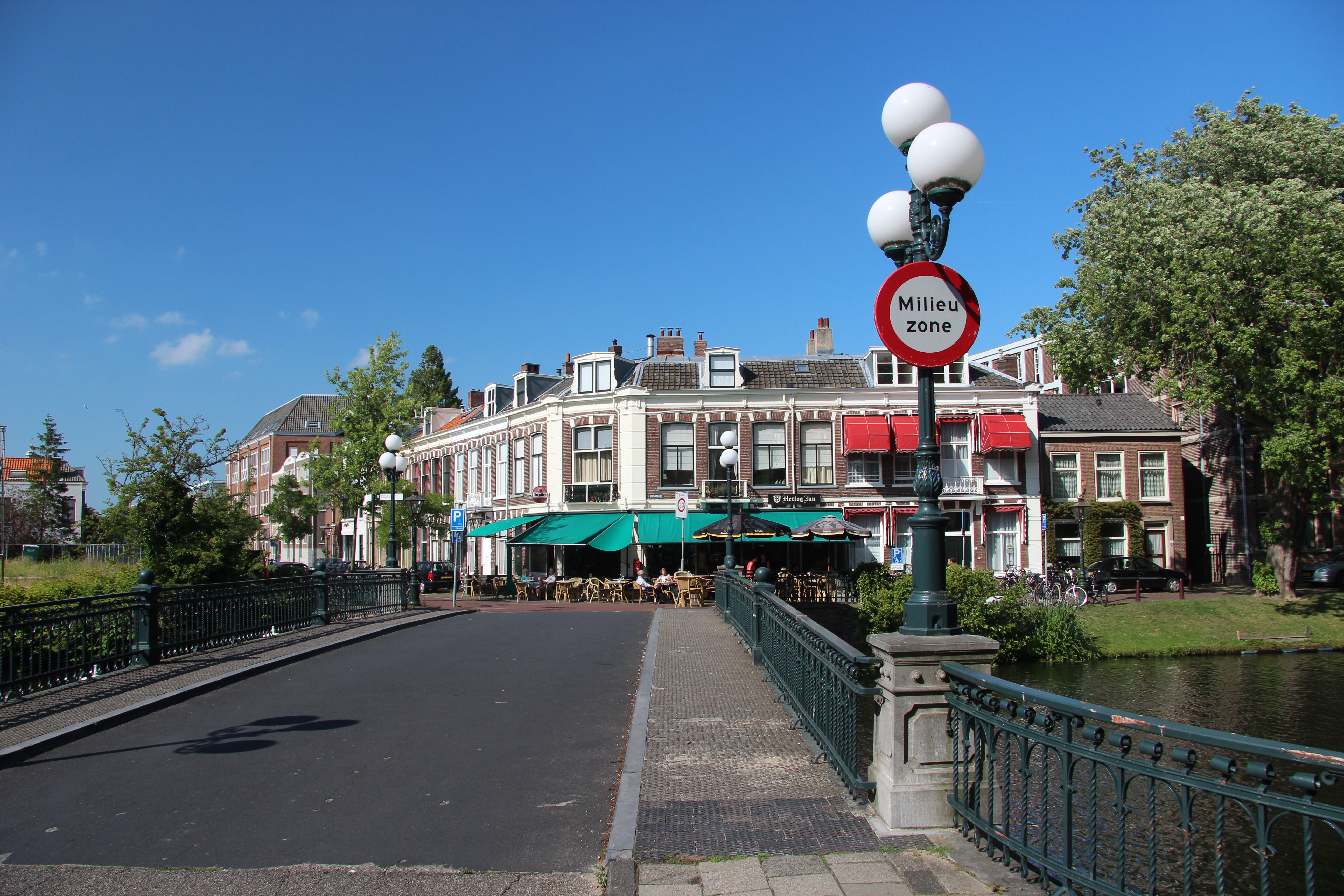 Aanduiding grens milieuzone op de Vreewijkbrug in Leiden.